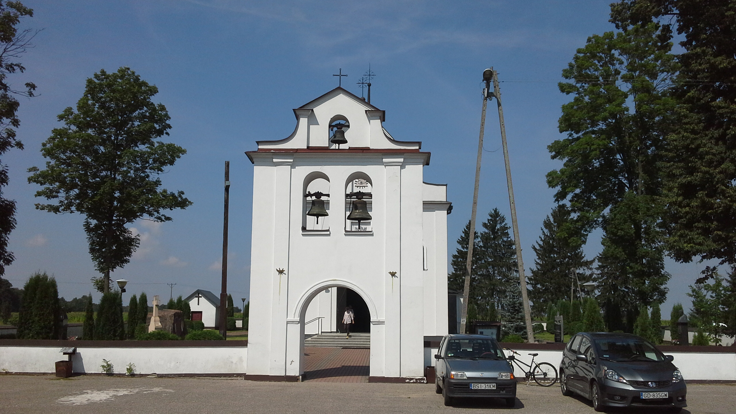 Brama-dzwonnica kościoła w Kłopotach-Stanisławach